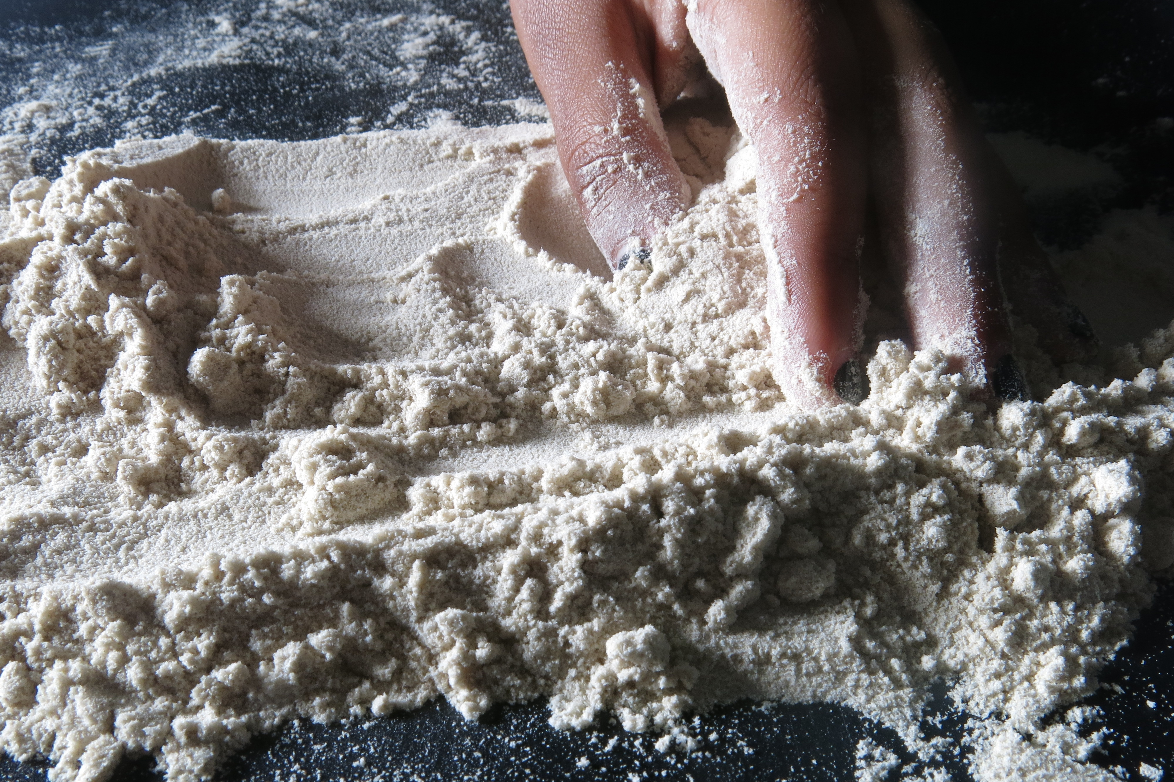 הטף הקמח של האתיופים